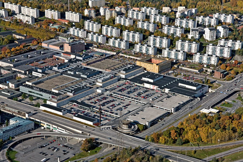 Skärholmen centrum mot NV. Vårbergsvägen och Skärholmsvägen i bildens förgrund. Motiv: Skärholmen Nyckelord: Flygbilder Kategori: Affärshus, BostadsområdeSkärholmen centrum mot NV. Vårbergsvägen och Skärholmsvägen i bildens förgrund.